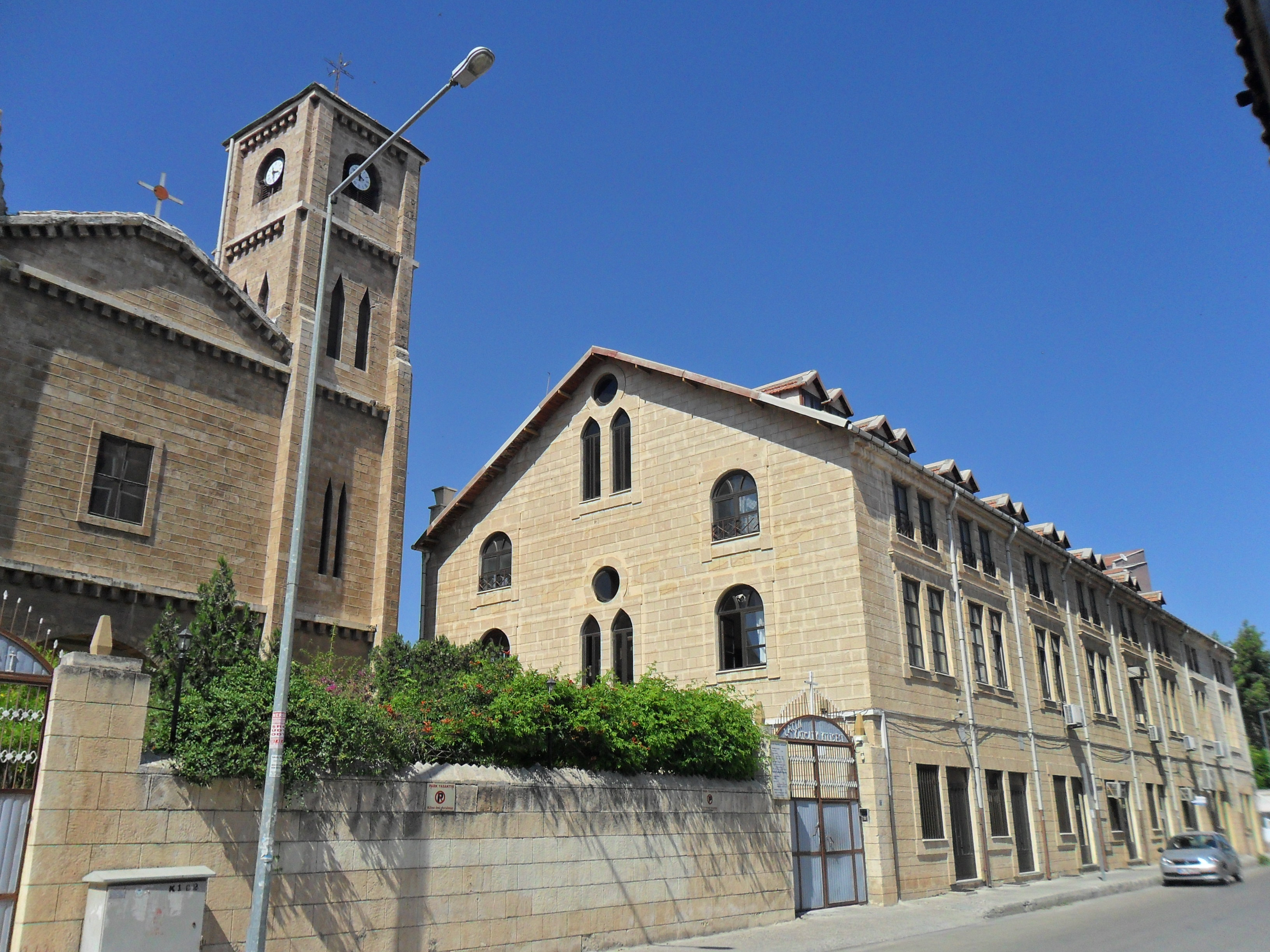 Mersin merkezde yer alan Sent Antuan Latin Katolik Kilisesi'nin ön cepheden görünüşü.